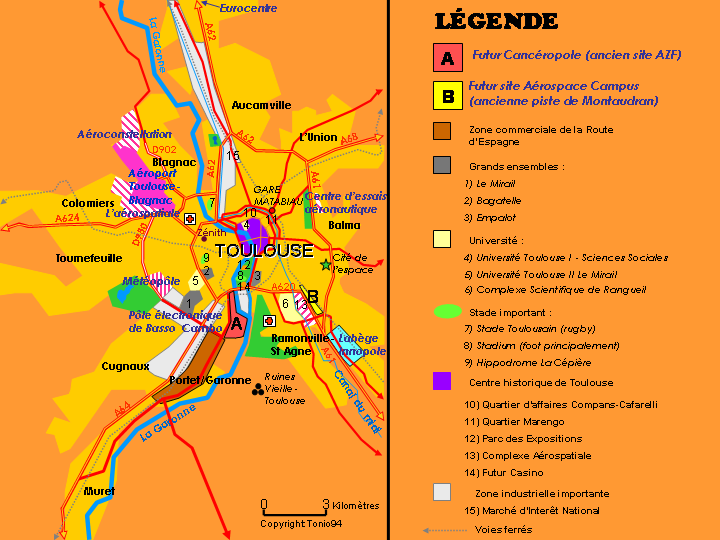 schéma de l'agglomération toulousaine avec les principales infrastructures actuelles et à venir. Schéma réalisé en octobre 2006 par Tonio94. Tonio94 s'engage à toute discussions concernant le schéma pouvant introduire d'éventuels modifications. Le schéma ici présent n'est pas une carte routière mais une carte de situation des infrastructures toulousaine.